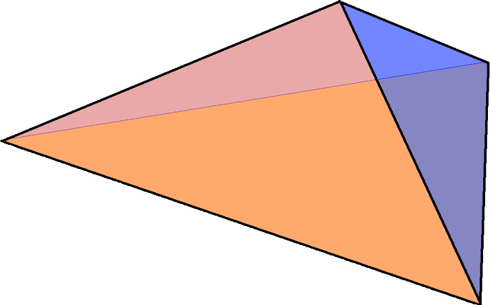 三角錐，半個雙三角錐